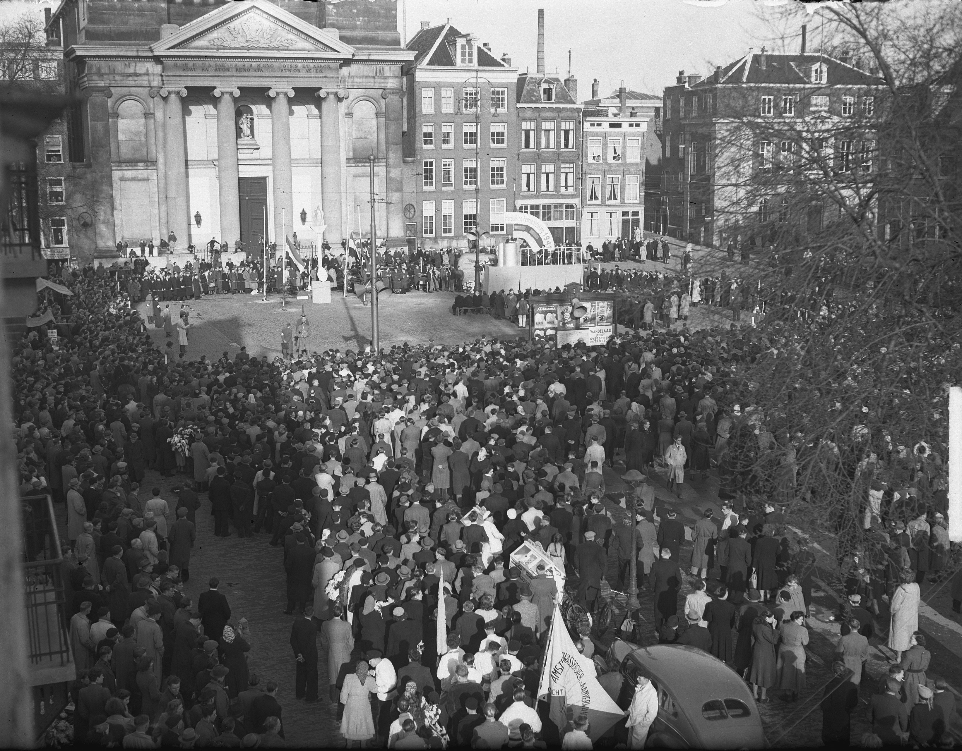 Collectie / Archief : Fotocollectie Anefo Reportage / Serie : [ onbekend ] Beschrijving : Herdenking februaristaking 1941, overzicht Datum : 25 februari 1950 Trefwoorden : FEBRUARISTAKING, herdenkingen, overzichten Fotograaf : Nijs, Jac. de / Anefo Auteursrechthebbende : Nationaal Archief Materiaalsoort : Glasnegatief Nummer archiefinventaris : bekijk toegang 2.24.01.09 Bestanddeelnummer : 903-8411